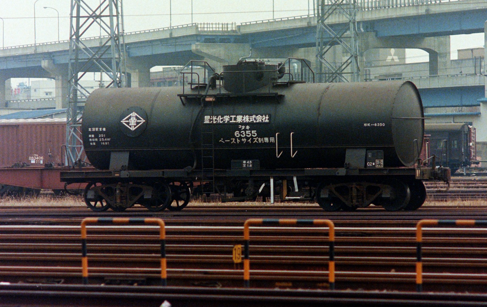 神戸港駅にて国鉄私有貨車タキ6350形式タキ6355(星光化学工業所有)